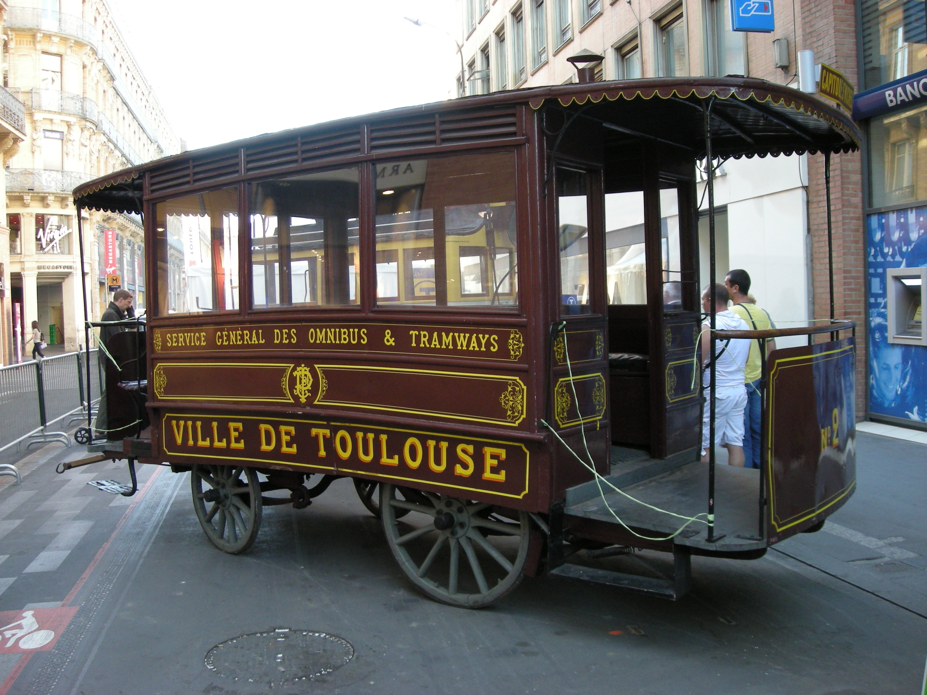 Ripert, important carrossier à Marseille, a conçu au début des années 1880 un omnibus à chevaux, plus pratique et plus léger que les omnibus Parisien, transposant pour la route le petit tramway à plates-formes extrêmes. La ville de Toulouse a adopté en 1881 le tramway Ripert qui a circulé jusqu'en 1913. Ce "Ripert" N°2, retrouvé en 1957 dans un hangar de la STCRT, est également entré au musée de Malakoff le 24 octobre 1957. Le "Ripert" dispose de 12 places assises en banquettes longitudinales. Ripert, a leading builder in Marseille, was conceived in the early 1880's a horse-drawn omnibus, more convenient and lighter than the Parisian omnibus, for implementing the road the little tram extremes platforms. The city of Toulouse in 1881 adopted the tram Ripert which circulated until 1913. This "Ripert" No. 2, found in 1957 in a hangar at STCRT, also entered the museum of Malakoff October 24, 1957. The "Ripert" has 12 seats in longitudinal bench.